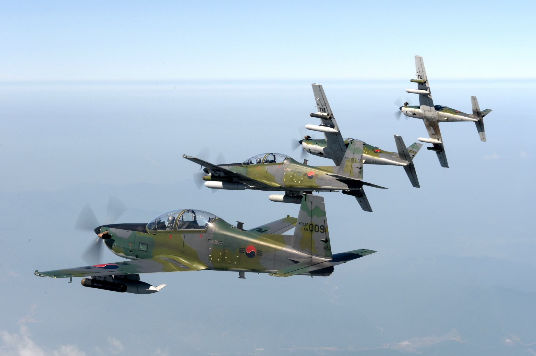 공군 제8전투비행단의 KA-1 전술통제기 편대가 10월 24일(금), 쾌청한 강원도 가을하늘을 누비며 비행임무를 수행하고 있다. KA-1 전술통제기는 국산 기본훈련기 KT-1에 로켓탄과 기관총으로 무장한 경공격기다. KT-1의 페루 수출형인 KT-1P의 초도 납품식이 최근 페루 라스팔마스 공군기지에서 거행되기도 했다.